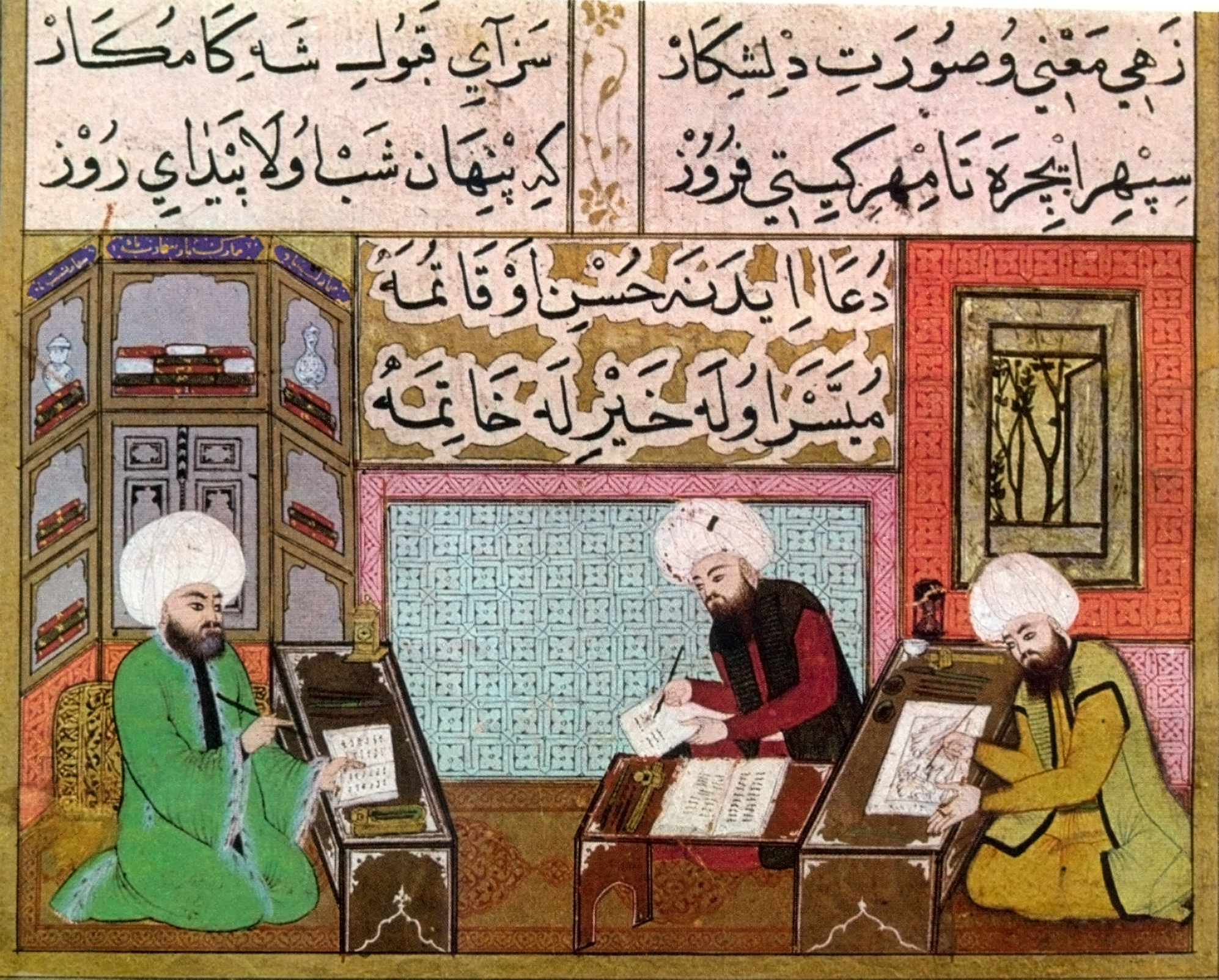 A kép baloldalán az udvari főtörténész, Talikizáde diktál a kalligráfusnak. Jobbra Nakkas Hasszán, az egri krónika illusztrátora éppen az egri vár feladási jelenetét készíti.